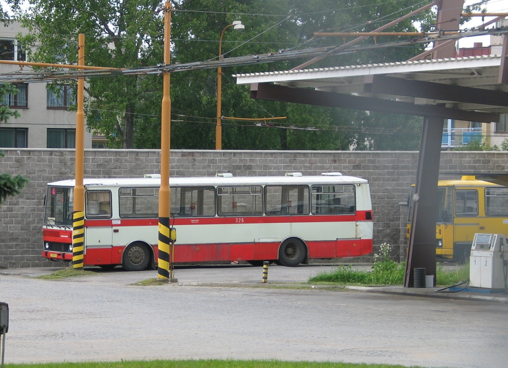 Karosa B 732, Jihlava